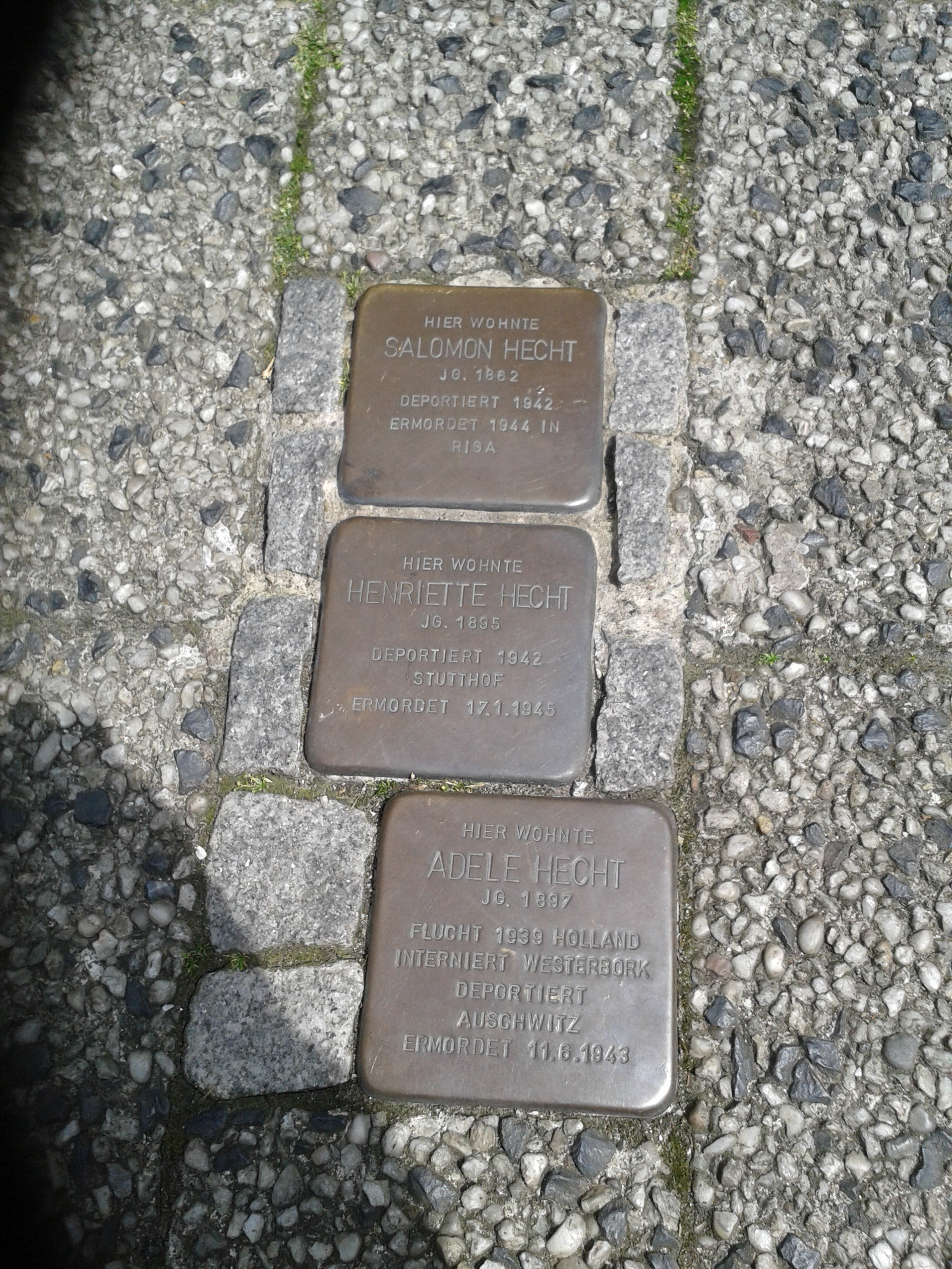 Stolpersteine Datteln Tigg 9